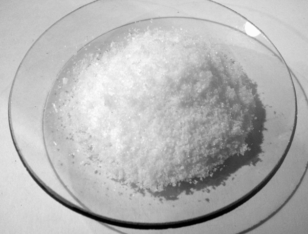 KBr